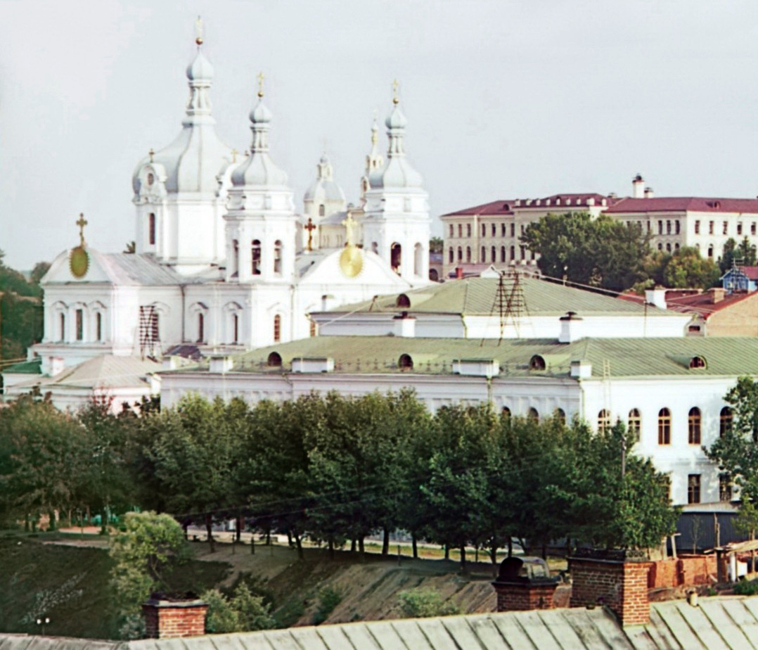 Беларуская (тарашкевіца): Віцебск (Viciebsk), квартал на рагу вуліц Вялікай (vulica Vialikaja) і Замкавай (vulica Zamkavaja). За ім — касьцёл Сьвятога Язэпа і калегіюм езуітаў